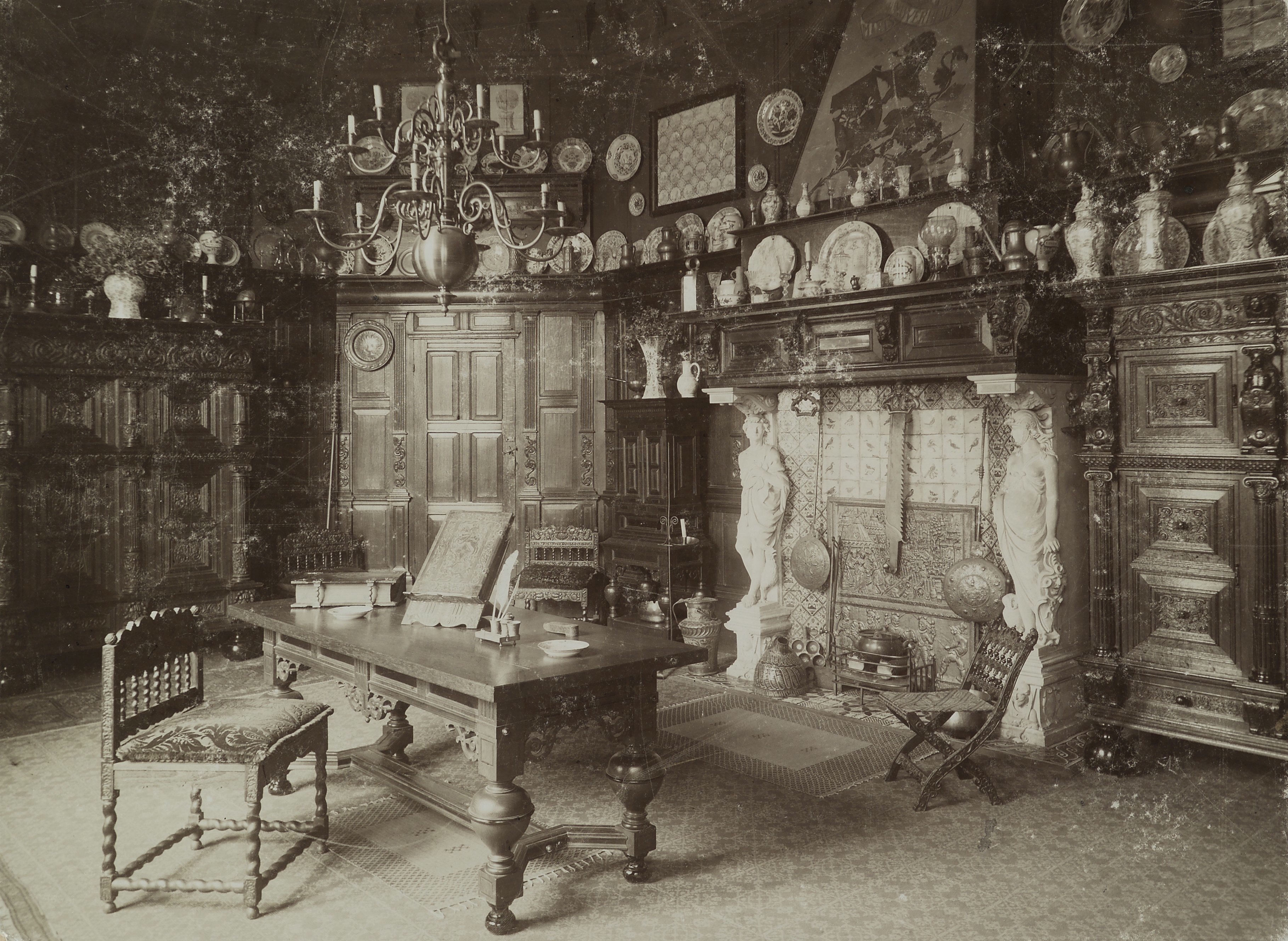 Museum voor Kunstnijverheid: Interieur raadzaal (opmerking: Op achterzijde plakker: Fotografie Berend Zweers, Groote Houtstraat 185, Haarlem.)